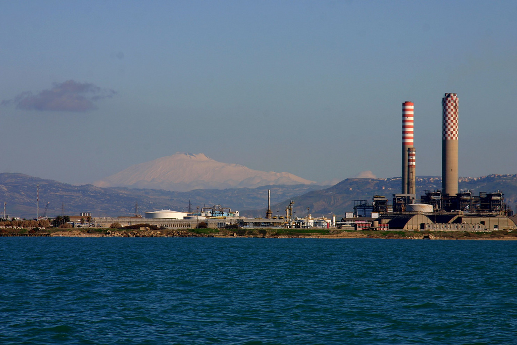 bella giornata,tersa e ventosa -dalla montagna(vulcano)madre, al mare di guai(ENI Gela)